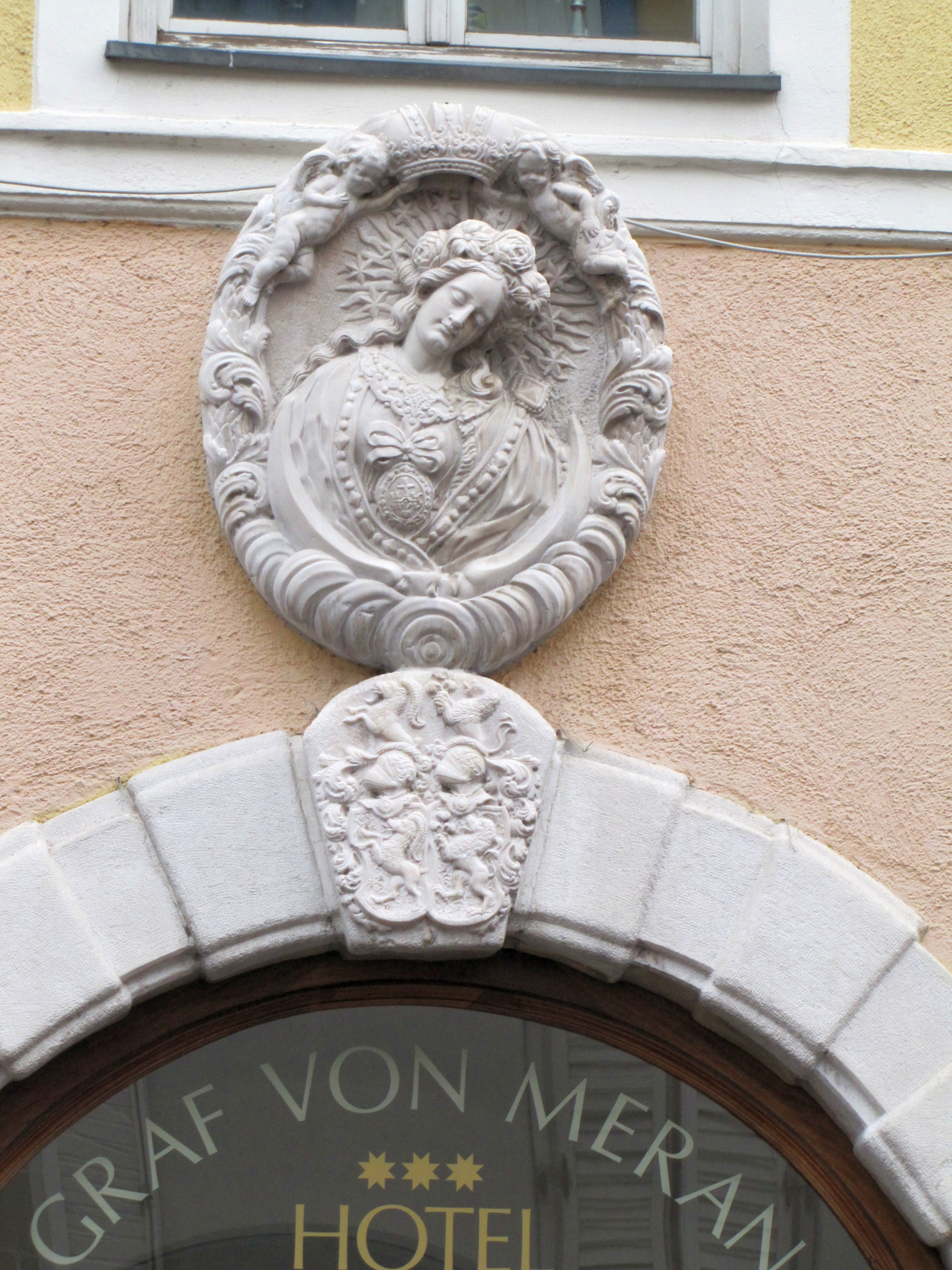 Maria darstellendes Marmorelief am Hotel Graf von Meran in Meran, Gregor Schwenzengast, ca. 1700